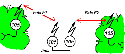 Verdoppelung der Reichweit (Funkfeld 1 plus Funkfeld 2) durch Betrieb von zwei Funkstellen R-105 als Relaisstelle, in der Betriebsart Retranslation.